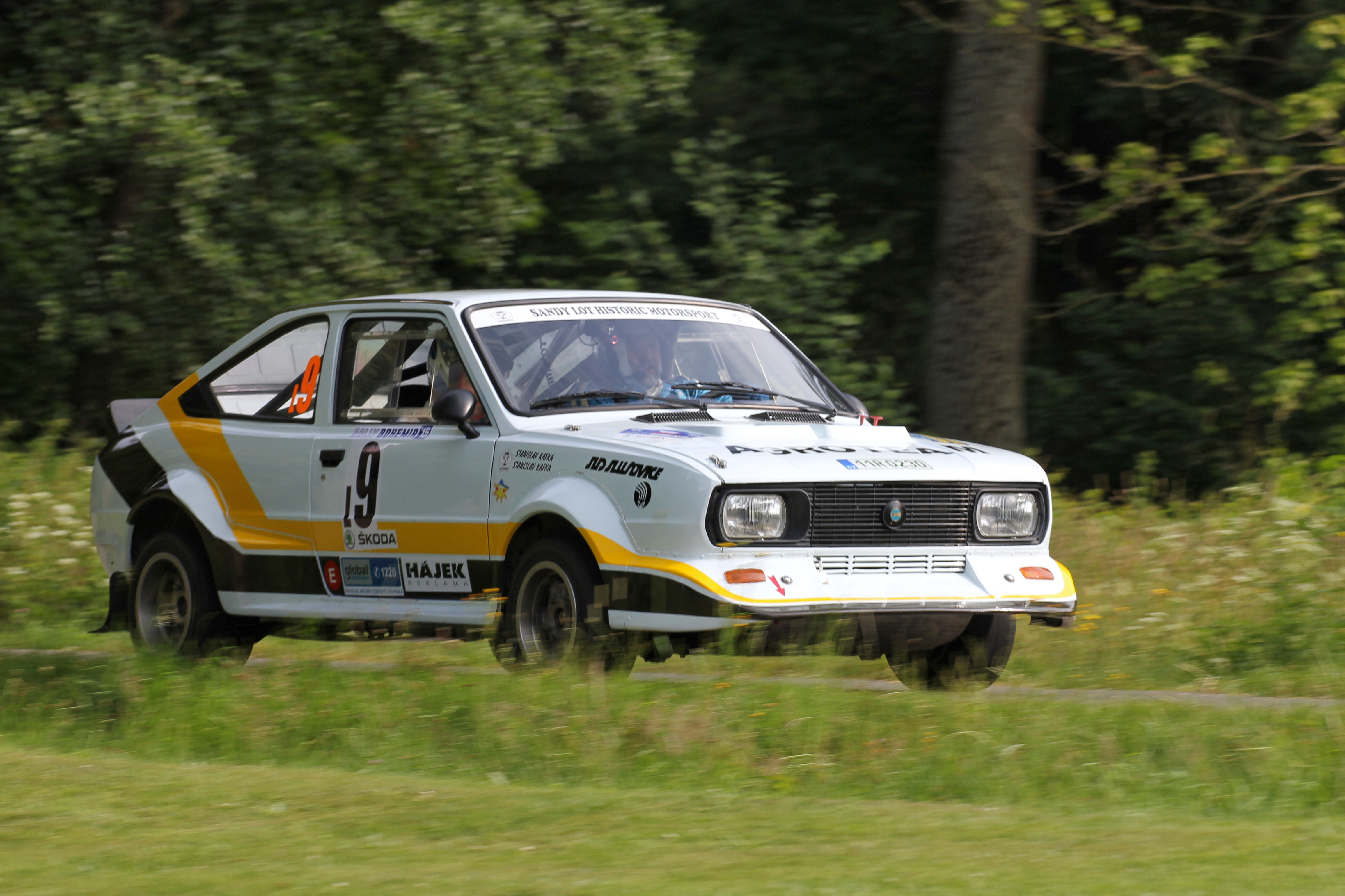 Rally Bohemia - Rally Legend